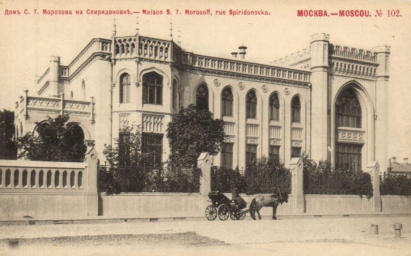 Особняк Морозовых на Спиридоновке